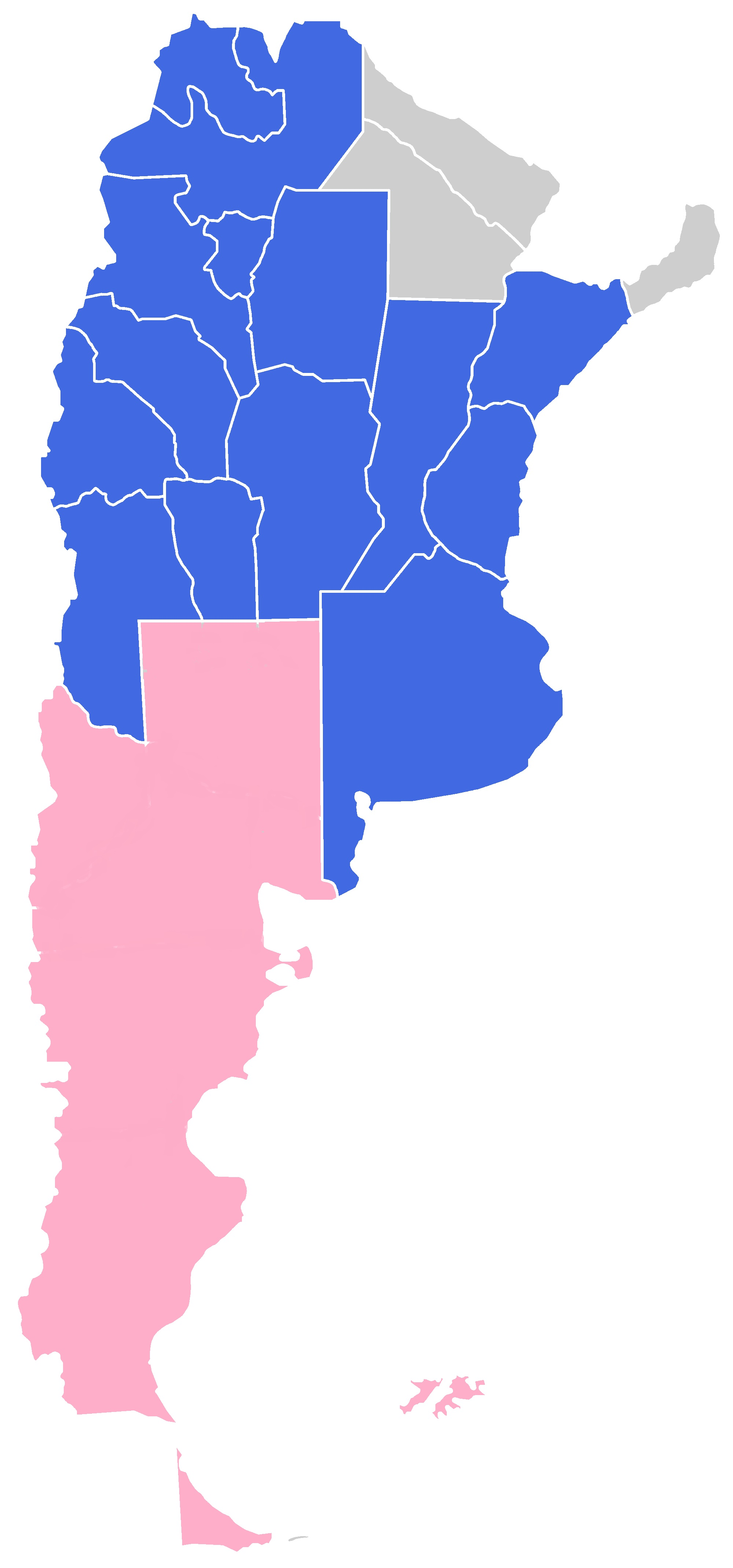 Límites fijados por la ley nacional Nº 947 del 5 de octubre de 1878. En rosa y gris los territorios nacionales. En azul las provincias.